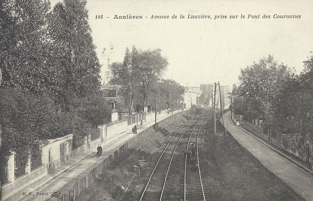 Asnieres, rue de la Lauziere, vue du Pont des Couronnes